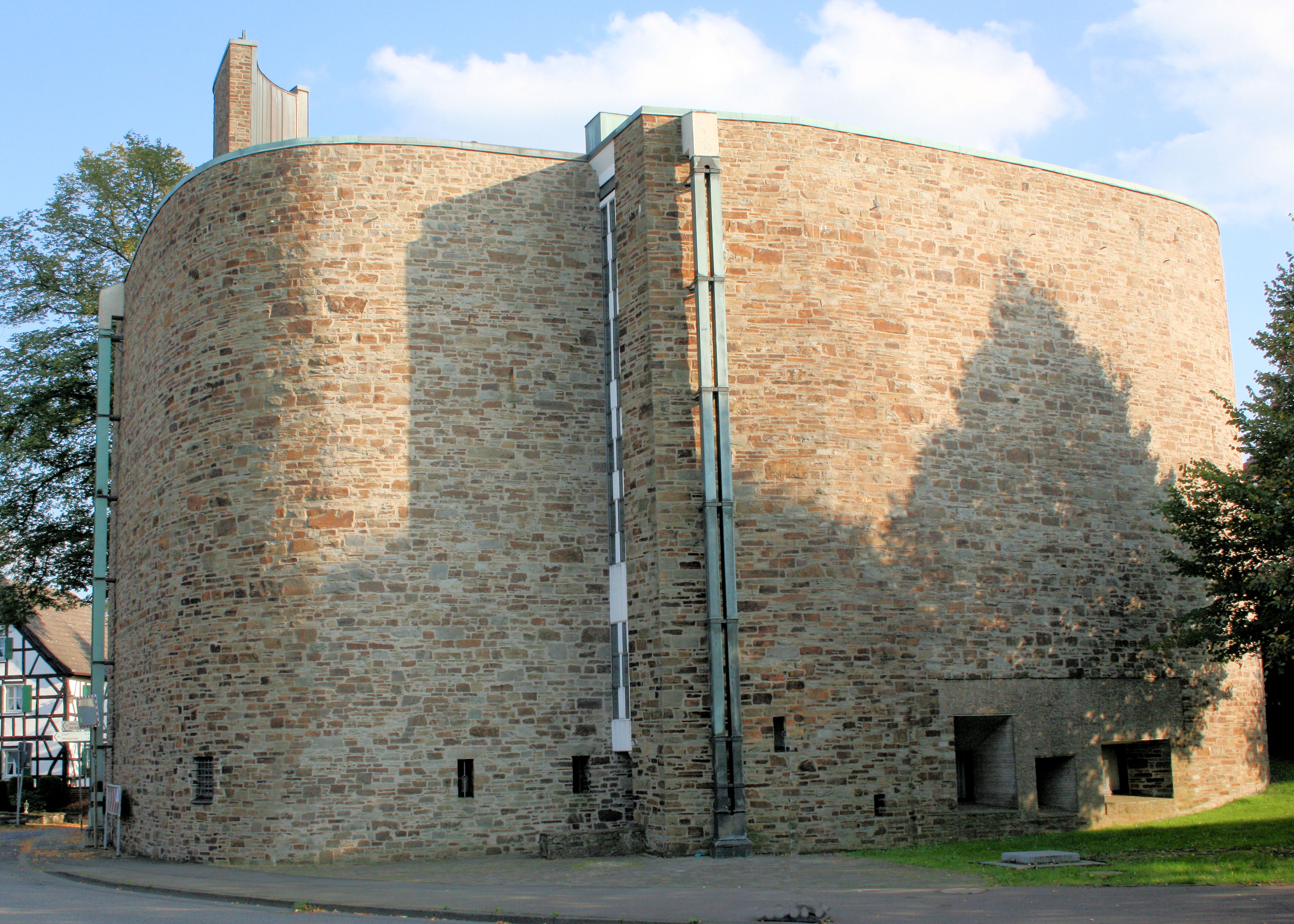 Heilig-Kreuz-Kirche in Süchterscheid, Hennef (Sieg)